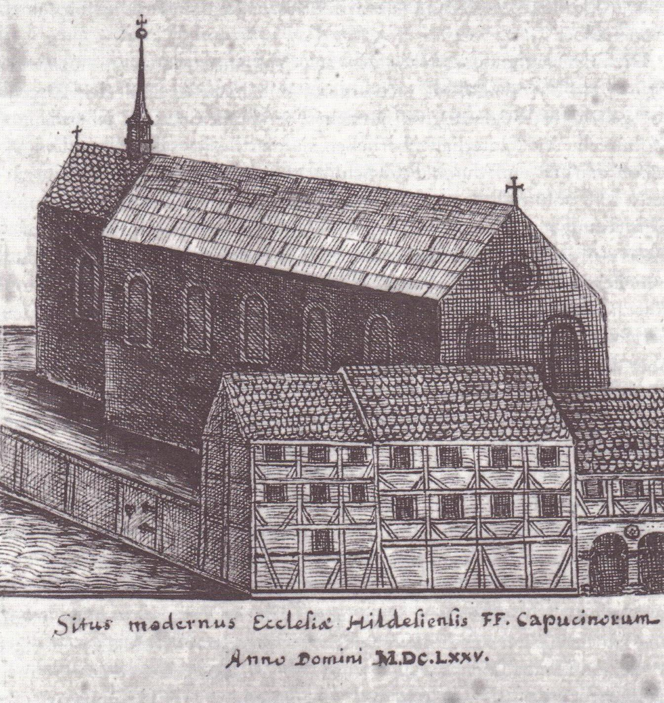 Hildesheim, Kapuzinerkloster auf dem Lüchtenhof, Ecke Brühl/Neue Straße (heute Priesterseminar) mit der 1662 erbauten, 1761 abgebrannten Klosterkirche